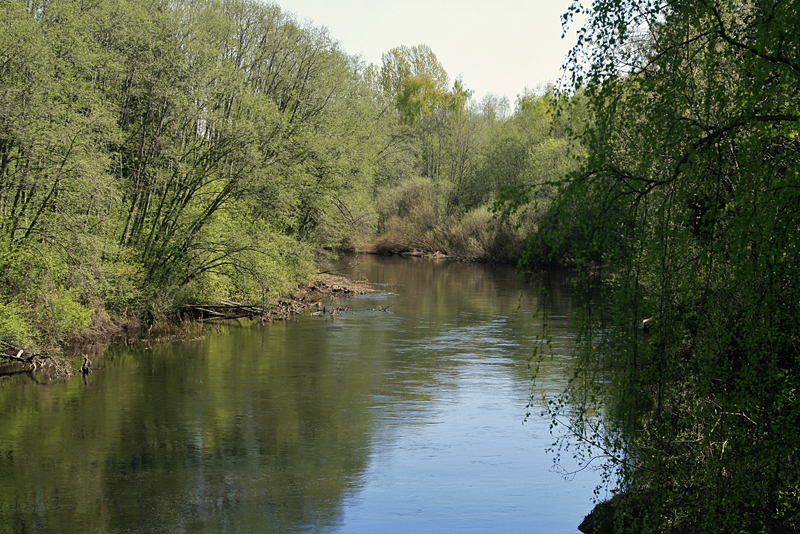 Svartelva, Hedmark, Norway. Near outlet in Mjøsa.